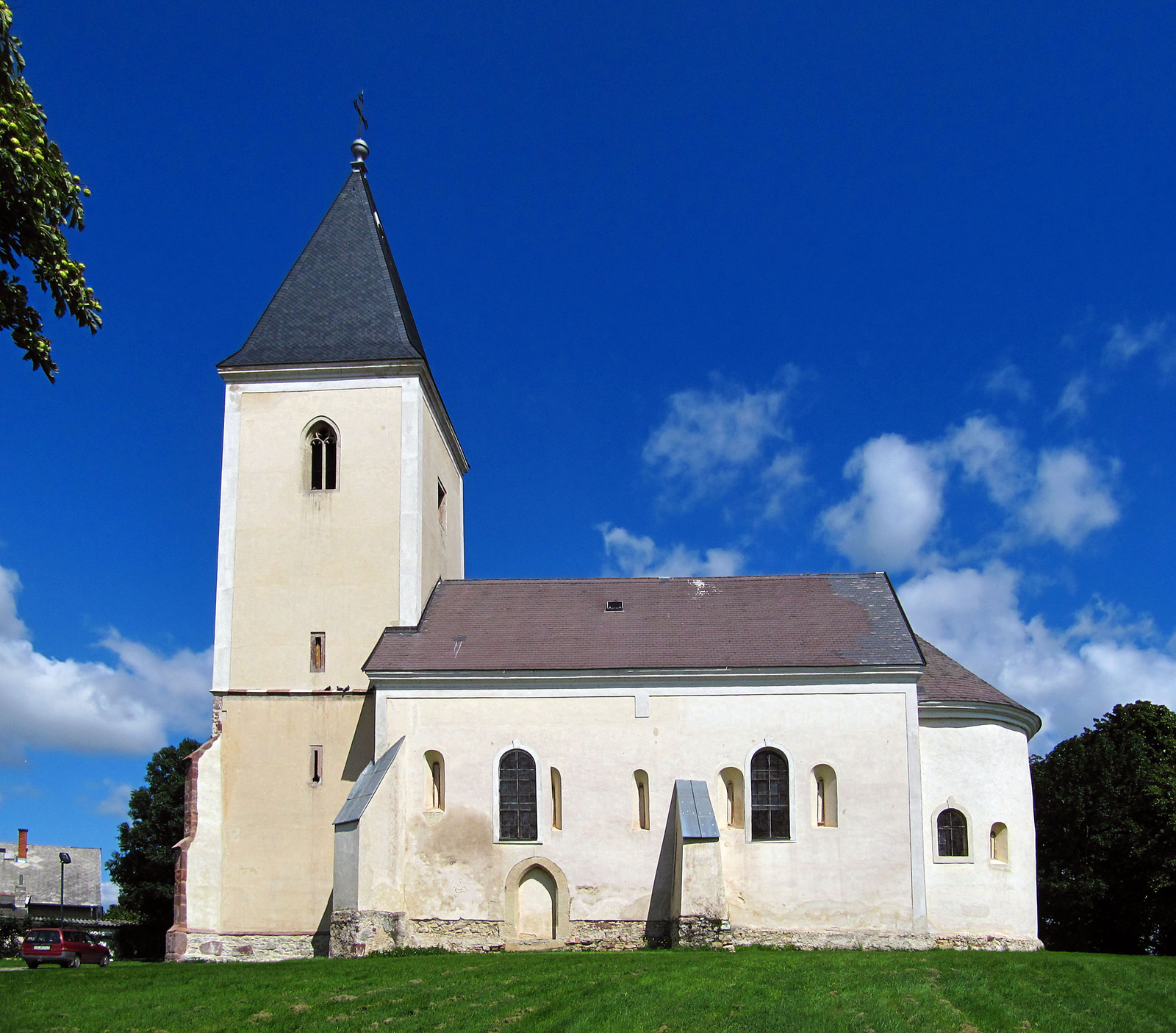 Szent István király római katolikus templom (Szentkirályszabadja, Petőfi Sándor u.)